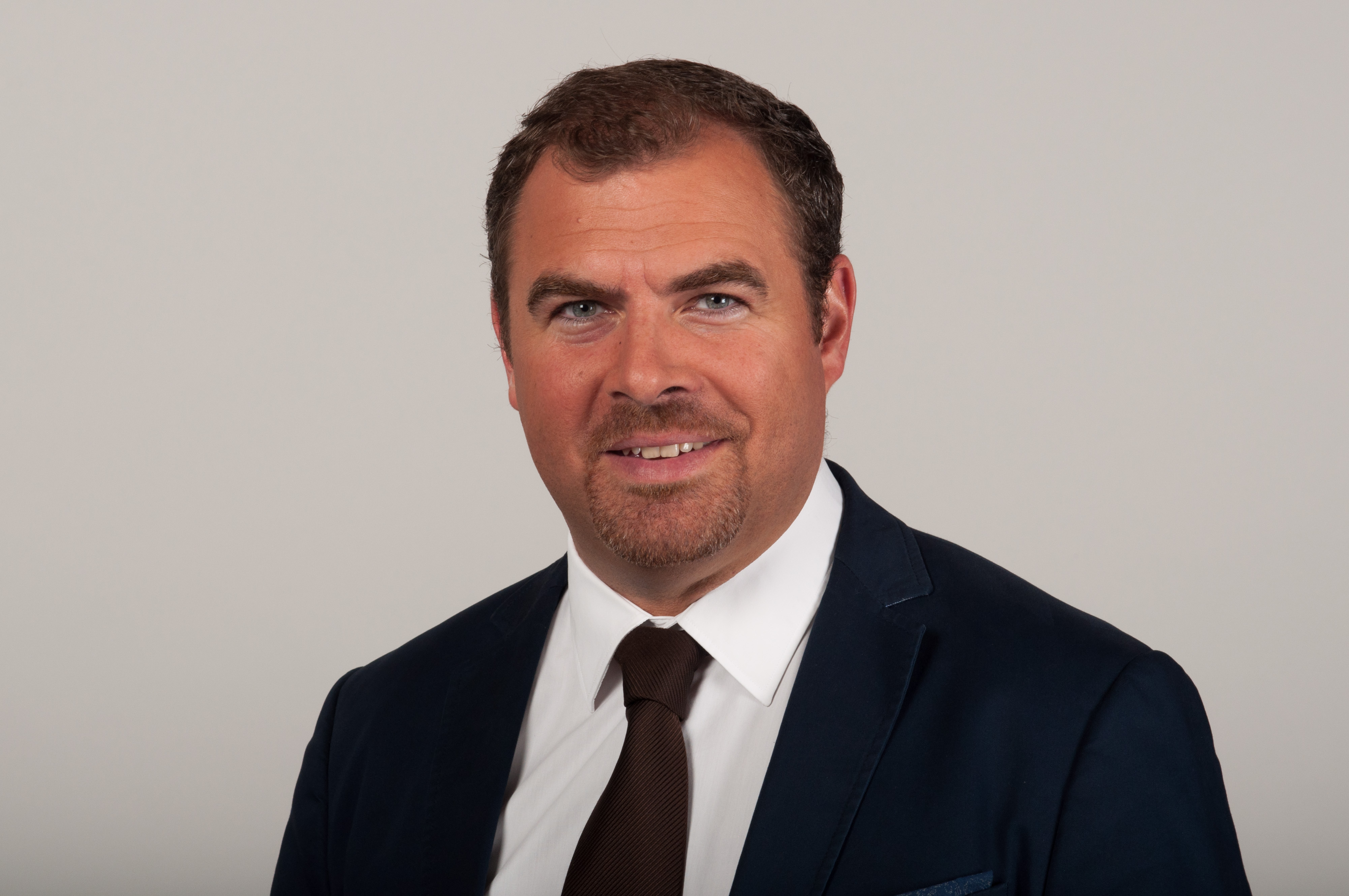 Florian Hahn (CSU), MdB